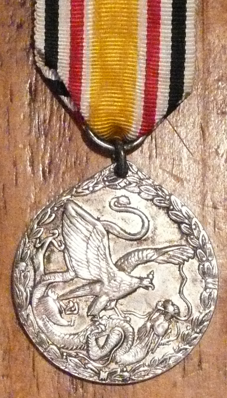 Chinadenkmünze